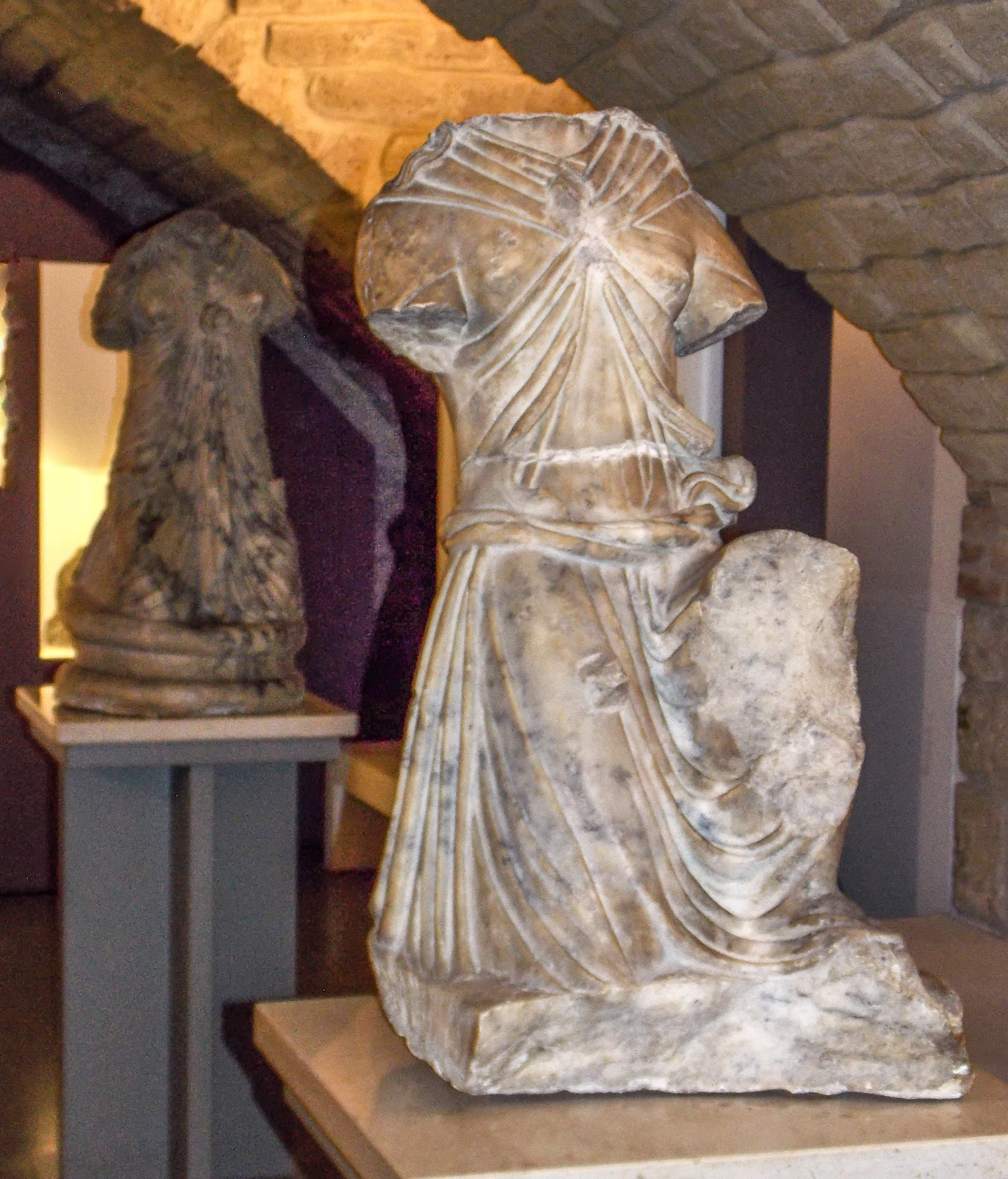 Un reperto del tempio di Iside di Benevento conservato nella sezione egizia del Museo del Sannio, presso il museo ARCOS. Sacerdotesse isiache.